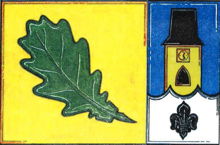 vlajka, Dubné, okres České Budějovice